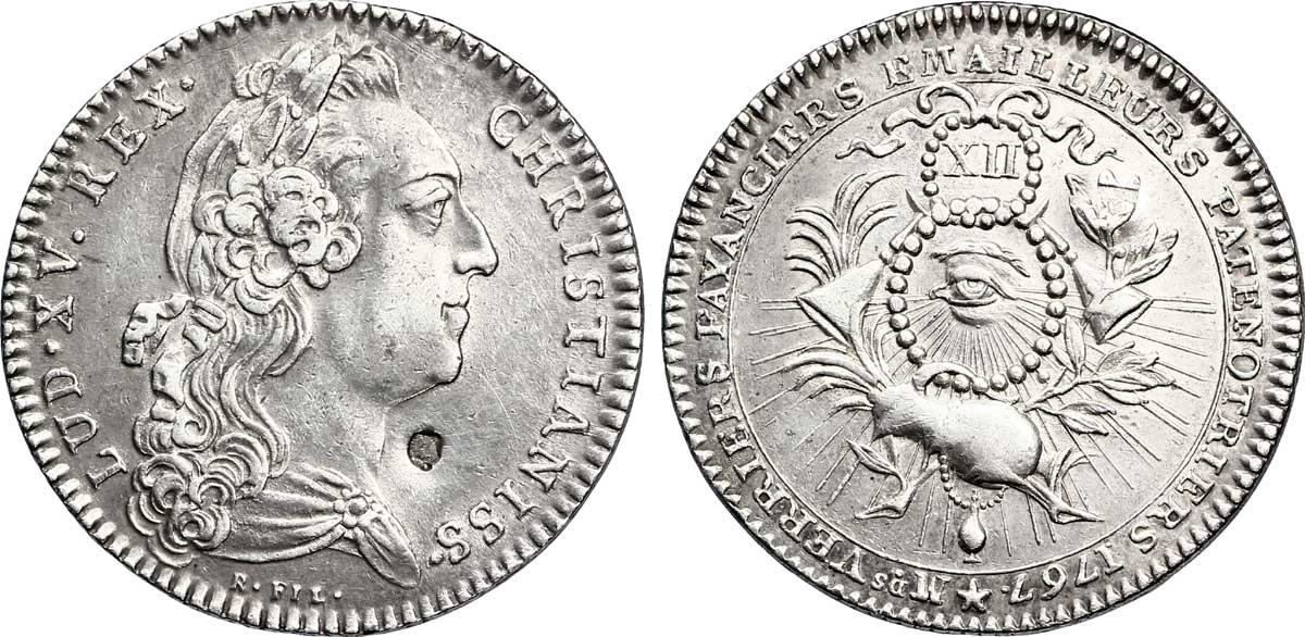 Jeton de le Corporation des Verriers, Fayenciers, Émailleurs, Patenôtriers, 1767.Les paternôtriers existent depuis le Moyen Âge, puisque l'on comptait par exemple quatorze d'entre eux à Paris sous le règne de Philippe le Bel. Ils formaient quatre corporations (ou trois confréries) décrites dans le Livre des métiers d'Étienne Boileau : patenôtriers d'ambre et de jais (ou jaïs, jayet, gaïet) patenôtriers de corail et de coquilles de nacre patenôtriers d'os et corne patenôtriers de boucles (boules et anneau pour vêtements) Les apprentis, enfants d'au moins douze ans, passaient entre cinq, huit (os) dix (jais) et douze (corail) années d'apprentissage pour devenir maîtres émailleurs et s'ils prenaient la fuite, le maître patenôtrier devait les attendre au moins une année et un jour. L'entrée dans la confrérie était payante (5 sous).